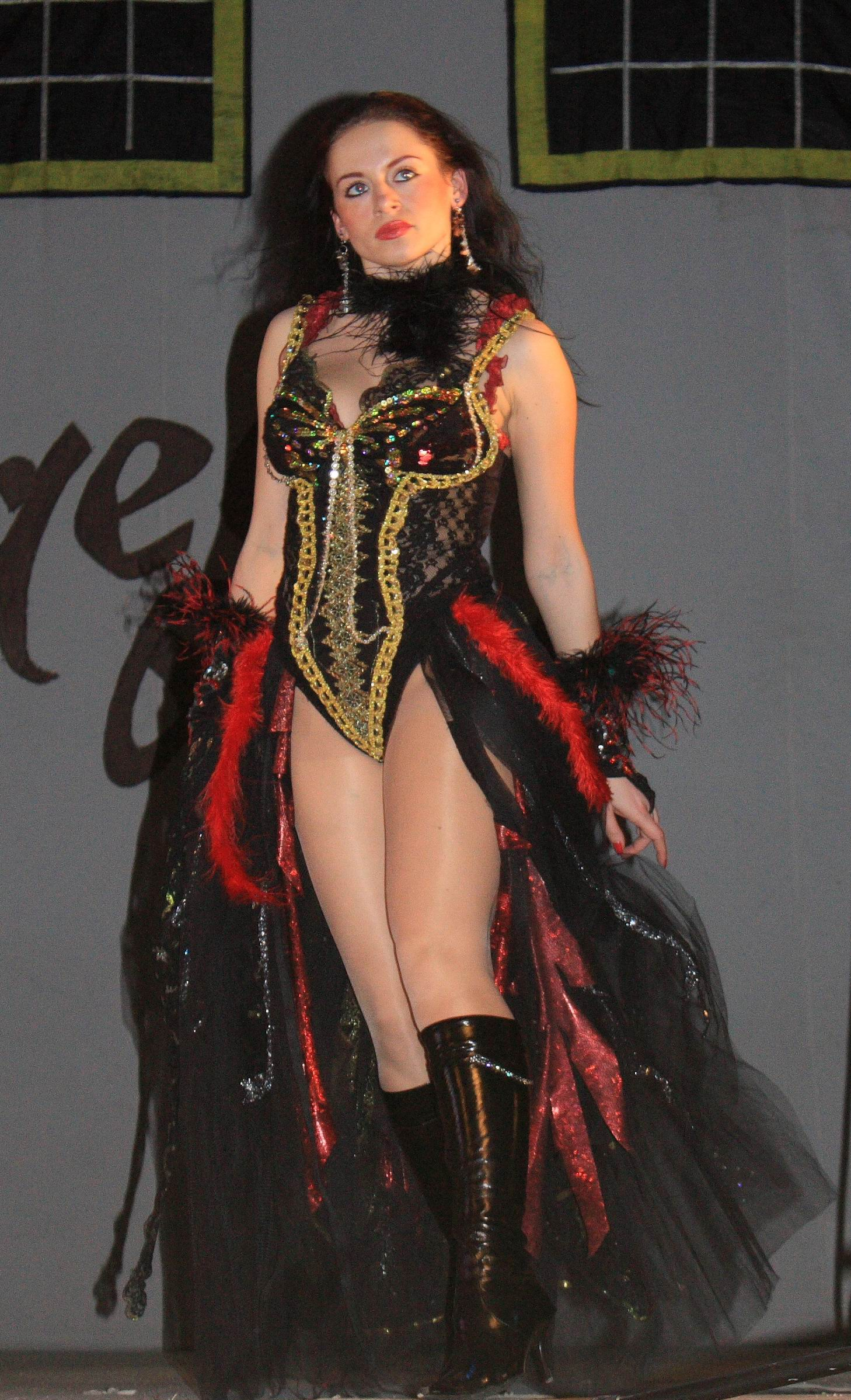 Спектакль Мастер и Маргарита. В роли Геллы - Яна Кузнецова(Трофимова).